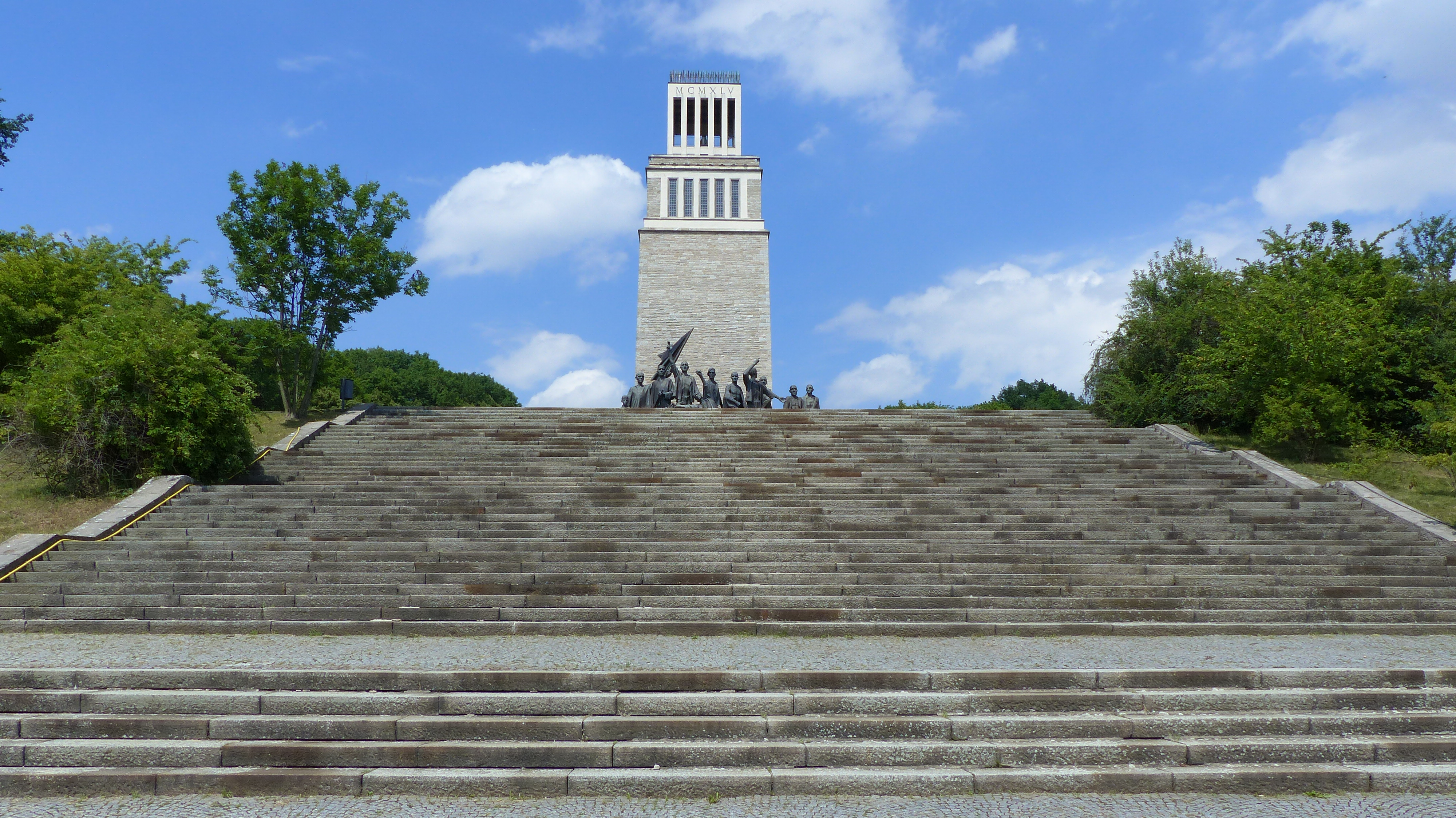 Gedenkstätte Buchenwald, Weimar